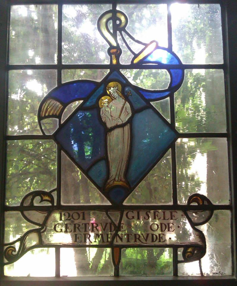 Vitrail aux armes des premières abbesses de la Cambre